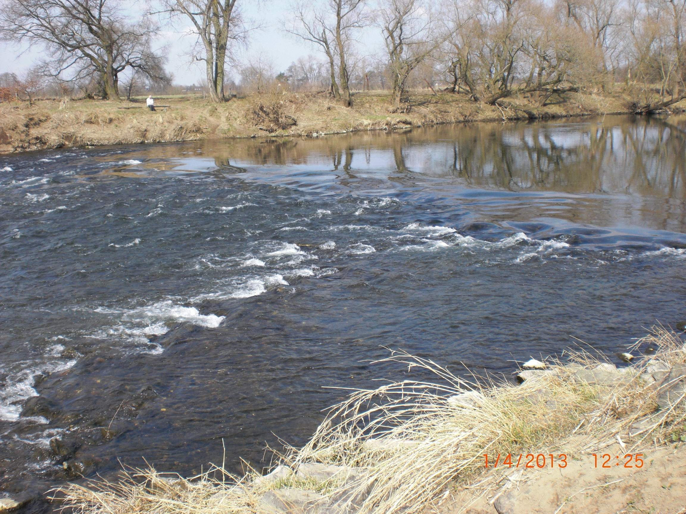 Die Furt von Meindorf in heutigem Zustand , an dieser Stelle setzte die französische Division Colaud am 1. Juni 1796 über die Sieg.